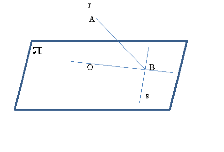 desenho ilustrativo